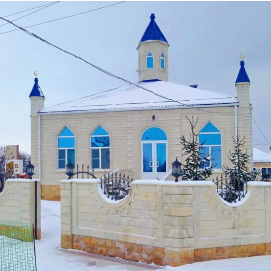 Мечеть в ауле Кургоковский